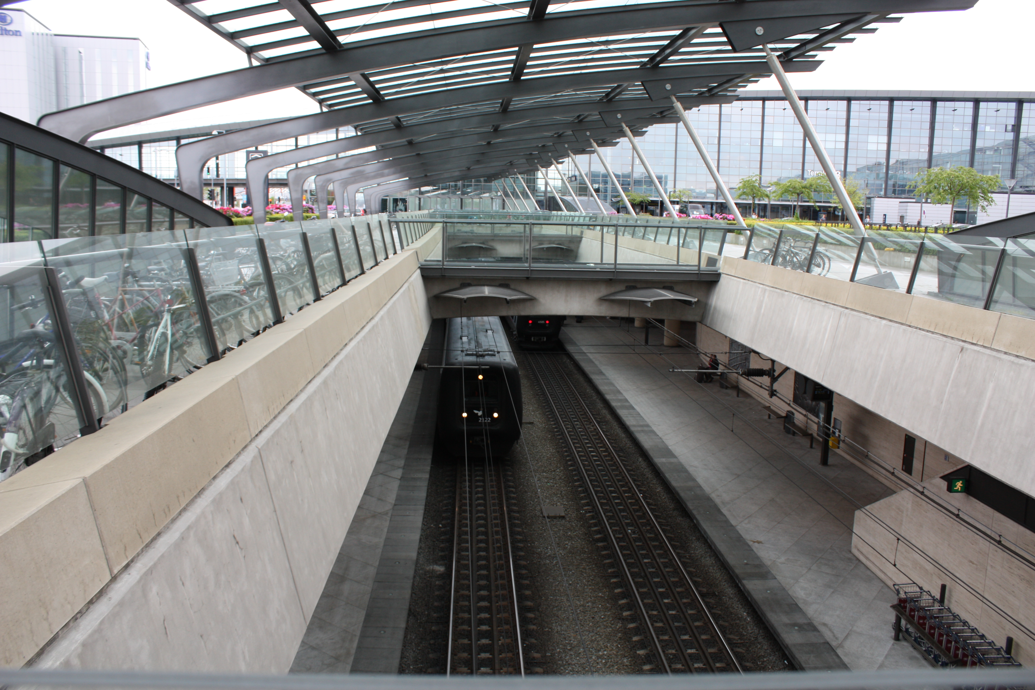 Flughafen Kopenhagen 2009